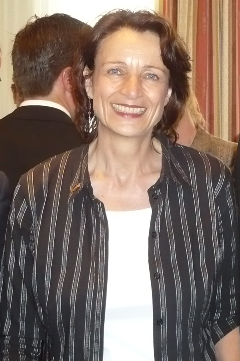 Member of German Parliament, Dagmar Freitag